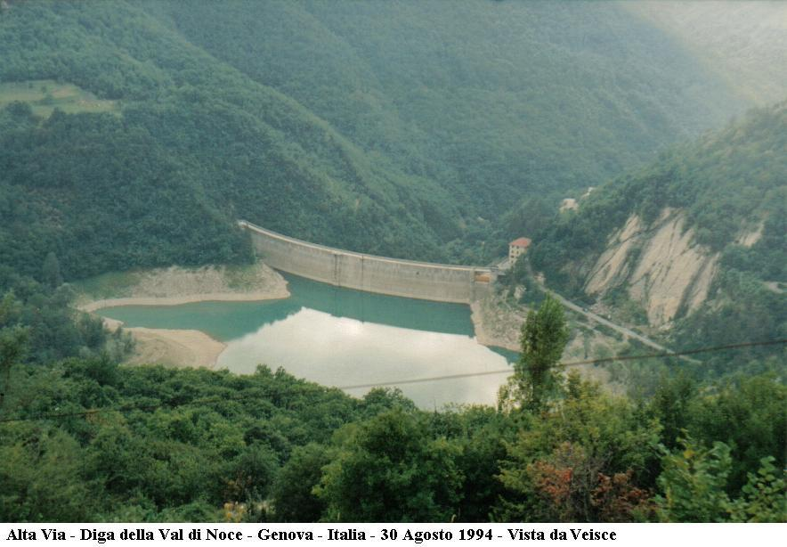 Alta Via - Diga Val di Noce - Genova - Italia - 1994 - Vista da Veisce - Itinerari Crocetta d'Orero-Creto